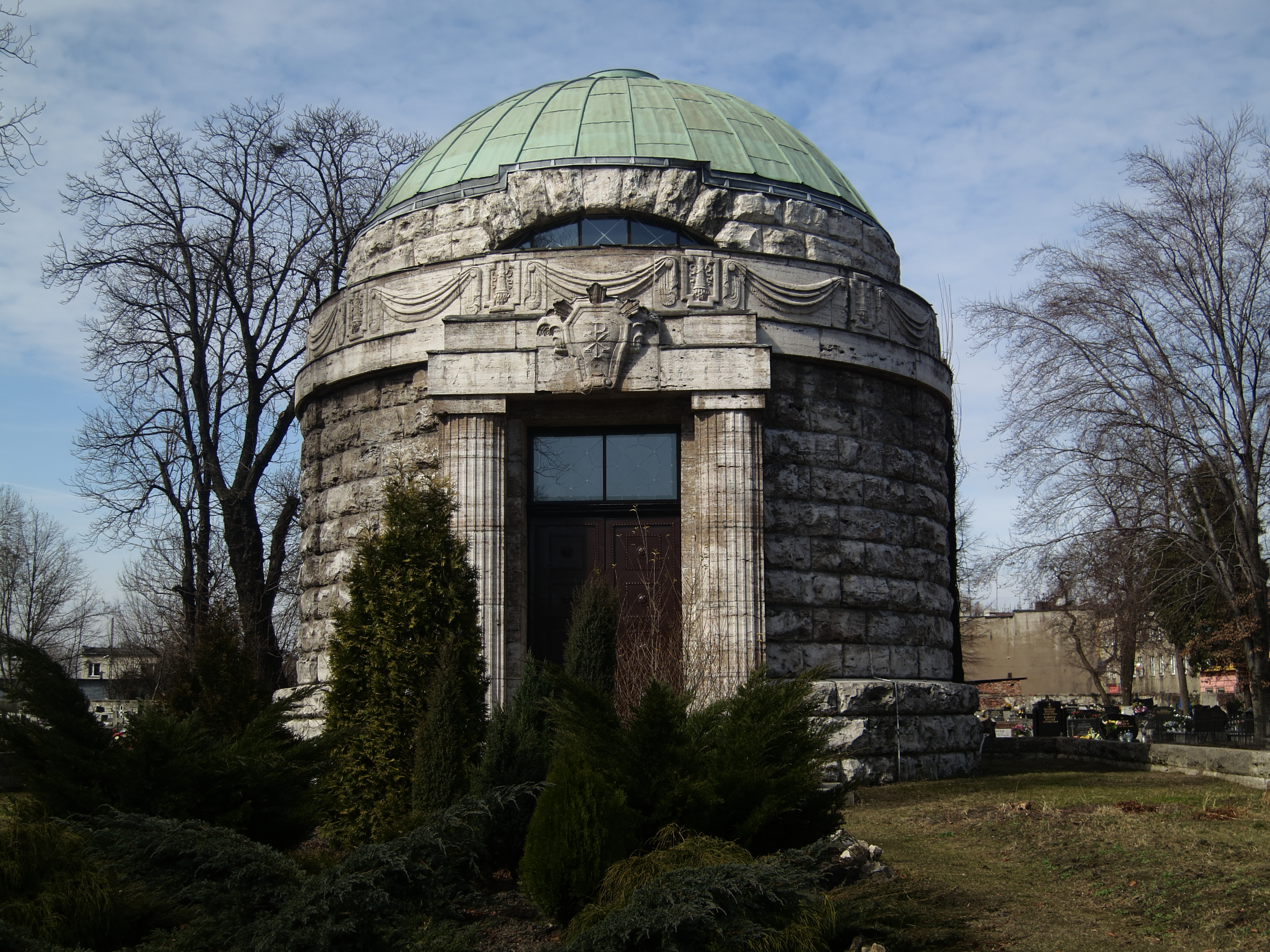 Sosnowiec, mauzoleum rodziny Dietlów, ob. kaplica cmentarna ewangelicka, 1912